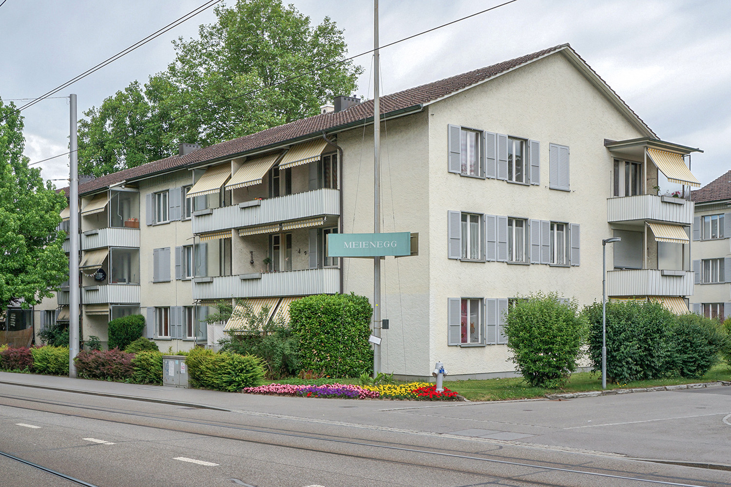 Bern, Siedlung Meienegg, 1949–1955, Hans und Gret Reinhard; Mehrfamilienhaus